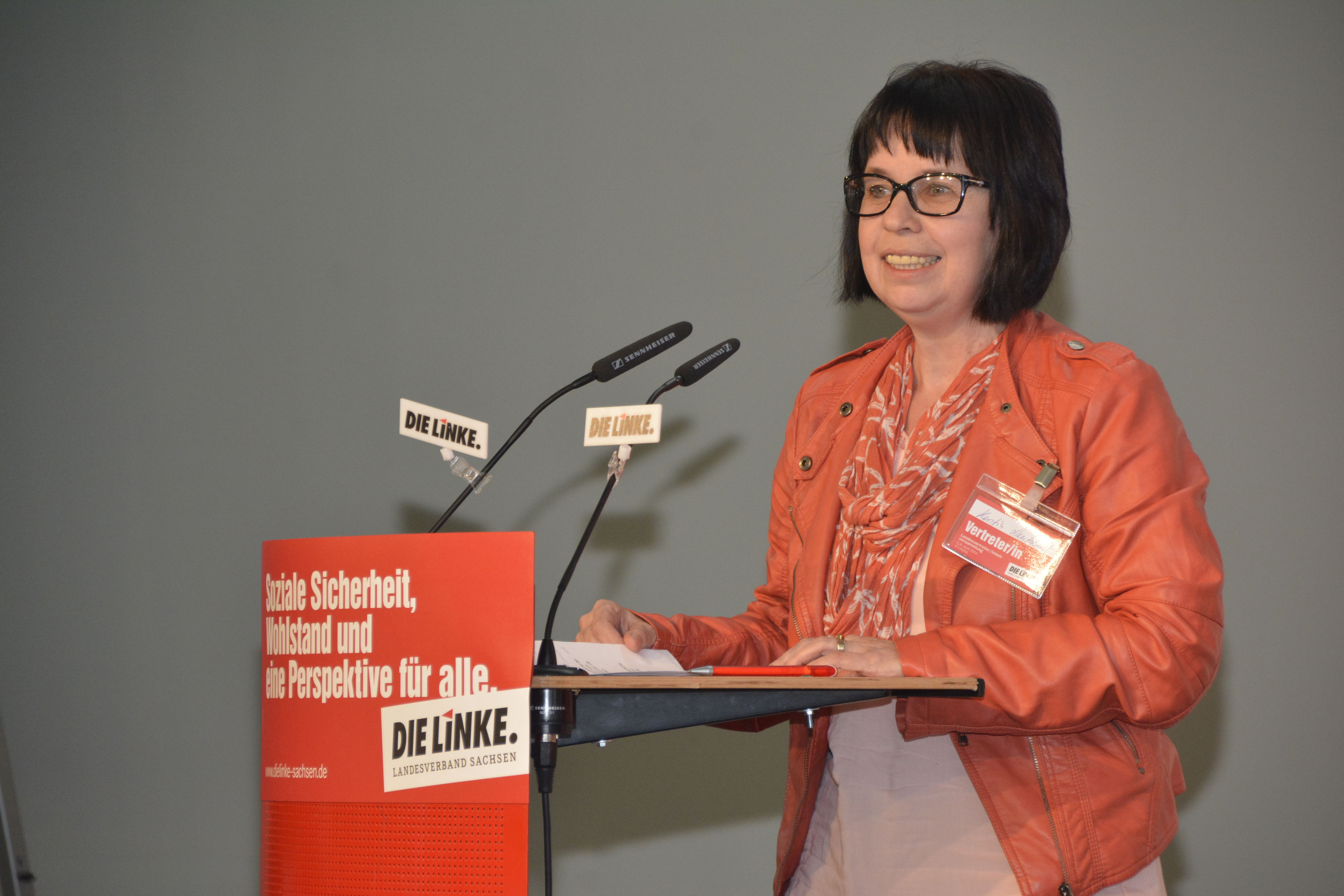 Kerstin Lauterbach, Mitglied des Sächsischen Landtages